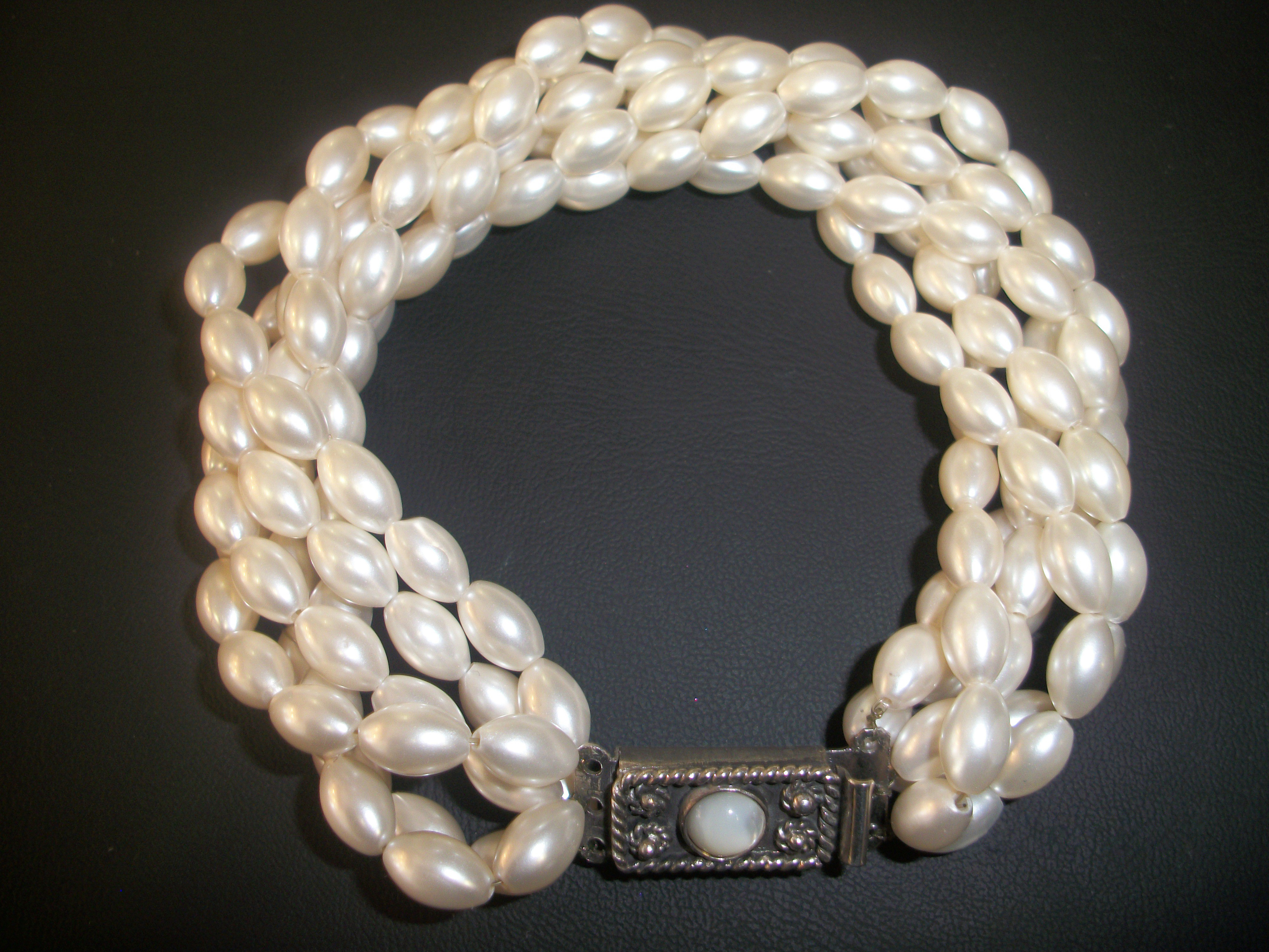 Нараквица од Охридски бисер со филигранско копче